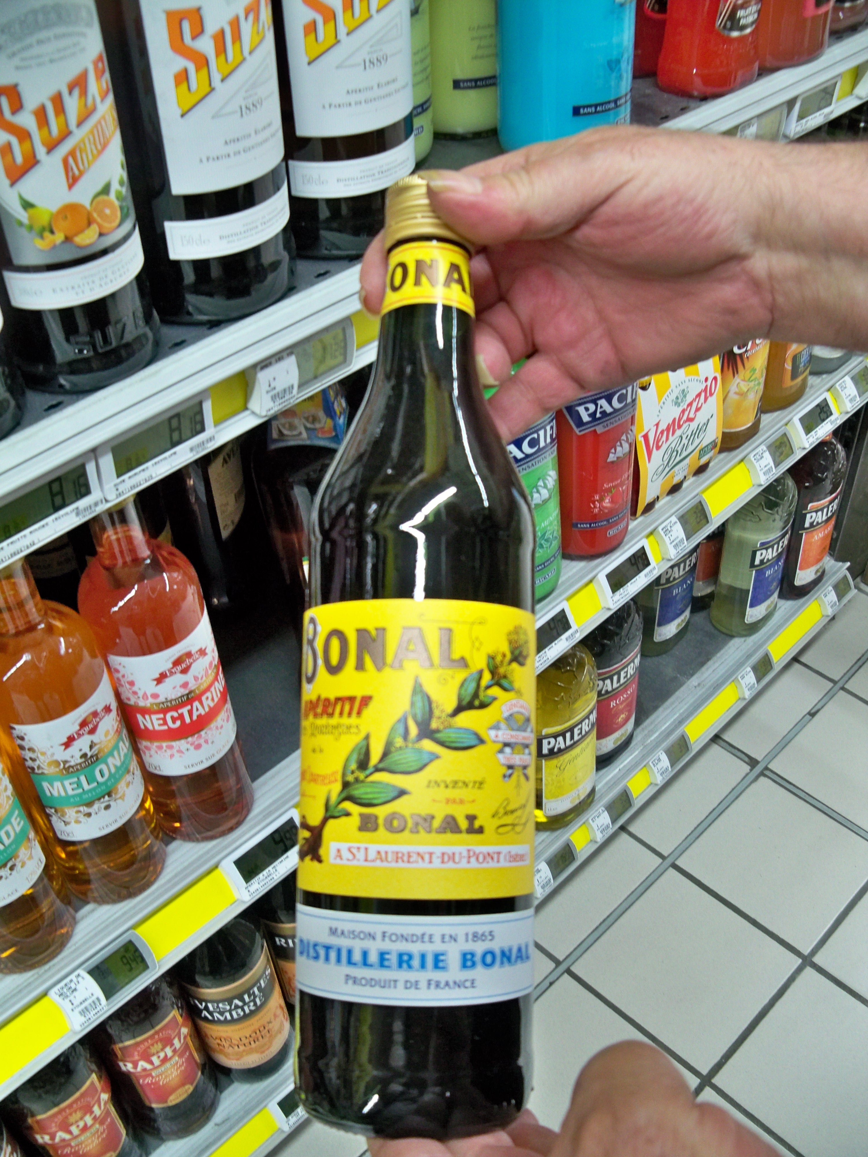 Apéritif Bonal, de Saint Laurent du Pont en Isère